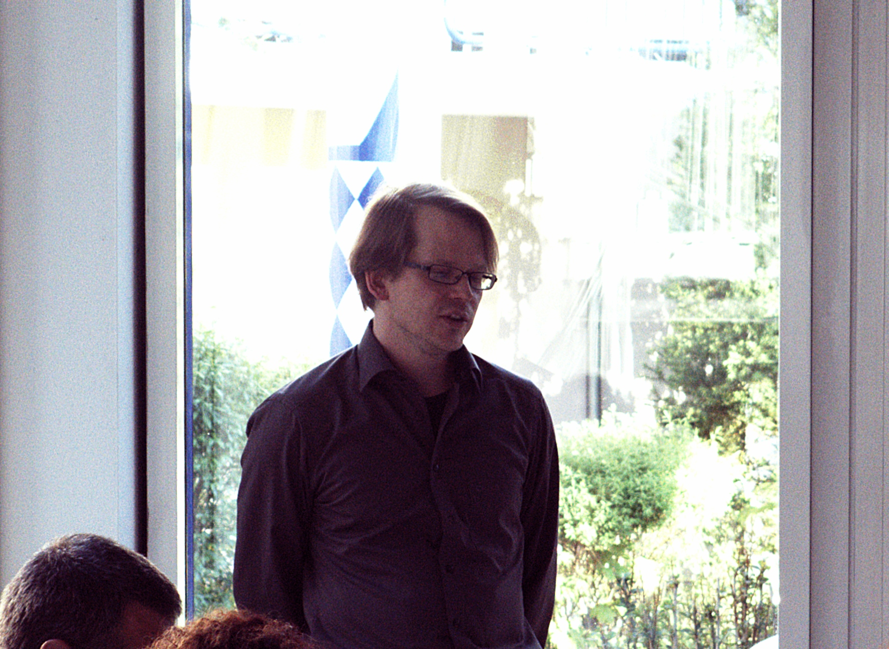 Daniel Scholten bei der Lesenacht 2017 in Unterhaching.